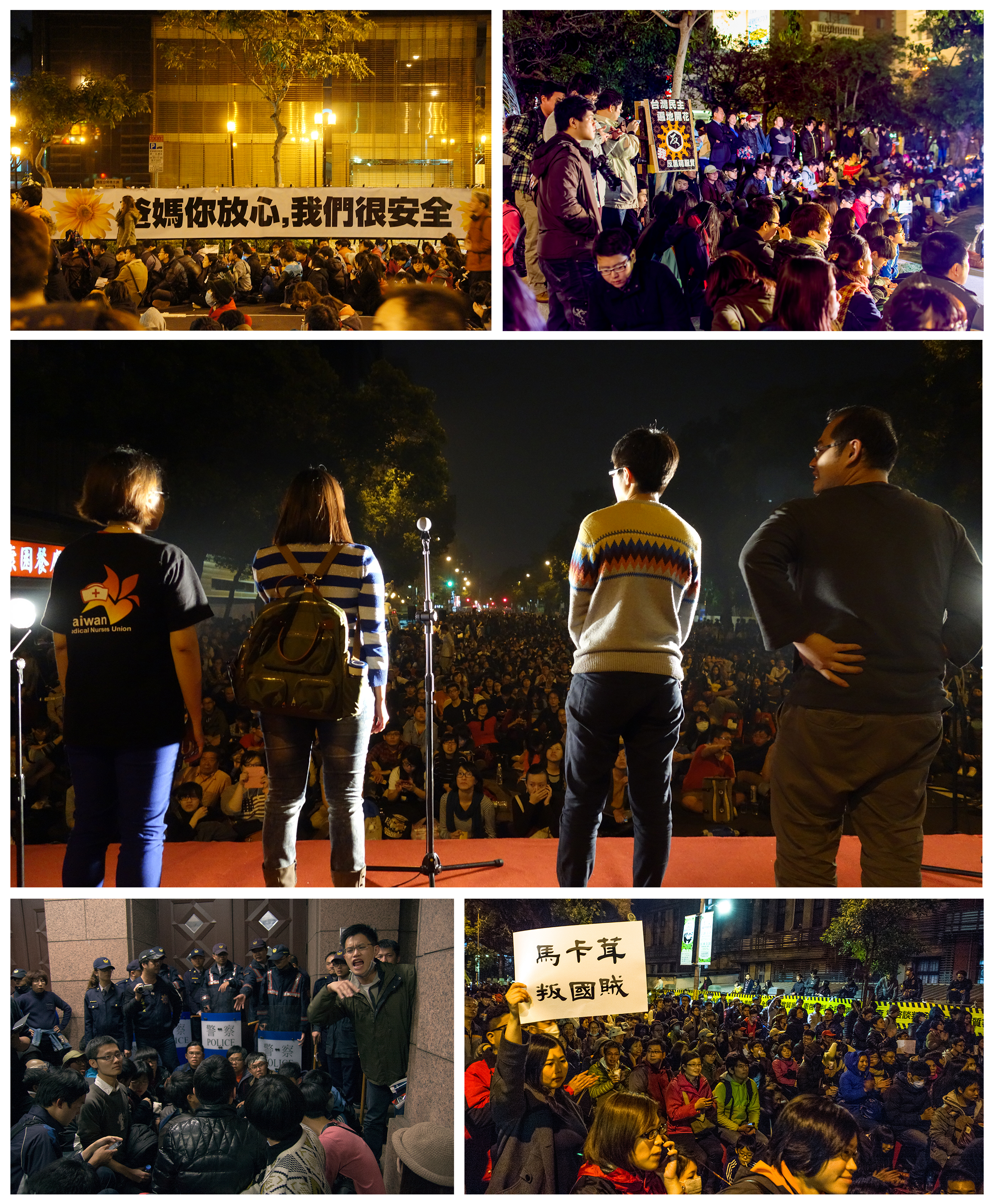 太陽花學運合圖。